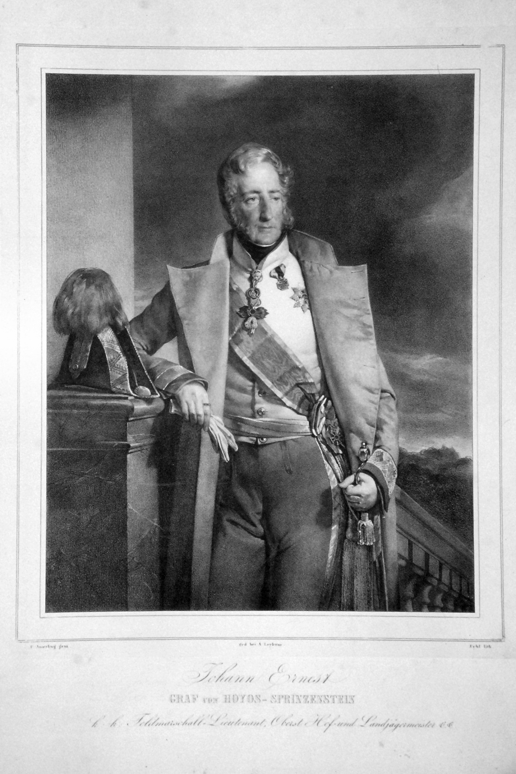 Johann Ernst von Hoyos-Sprinzenstein (1779-1849), Graf, Feldmarschallleutnant, Ritter des Goldenen Vlieses, Hofbeamter. Lithographie von Franz Eybl, nach einem Gemälde von Friedrich Amerling. Um 1840.